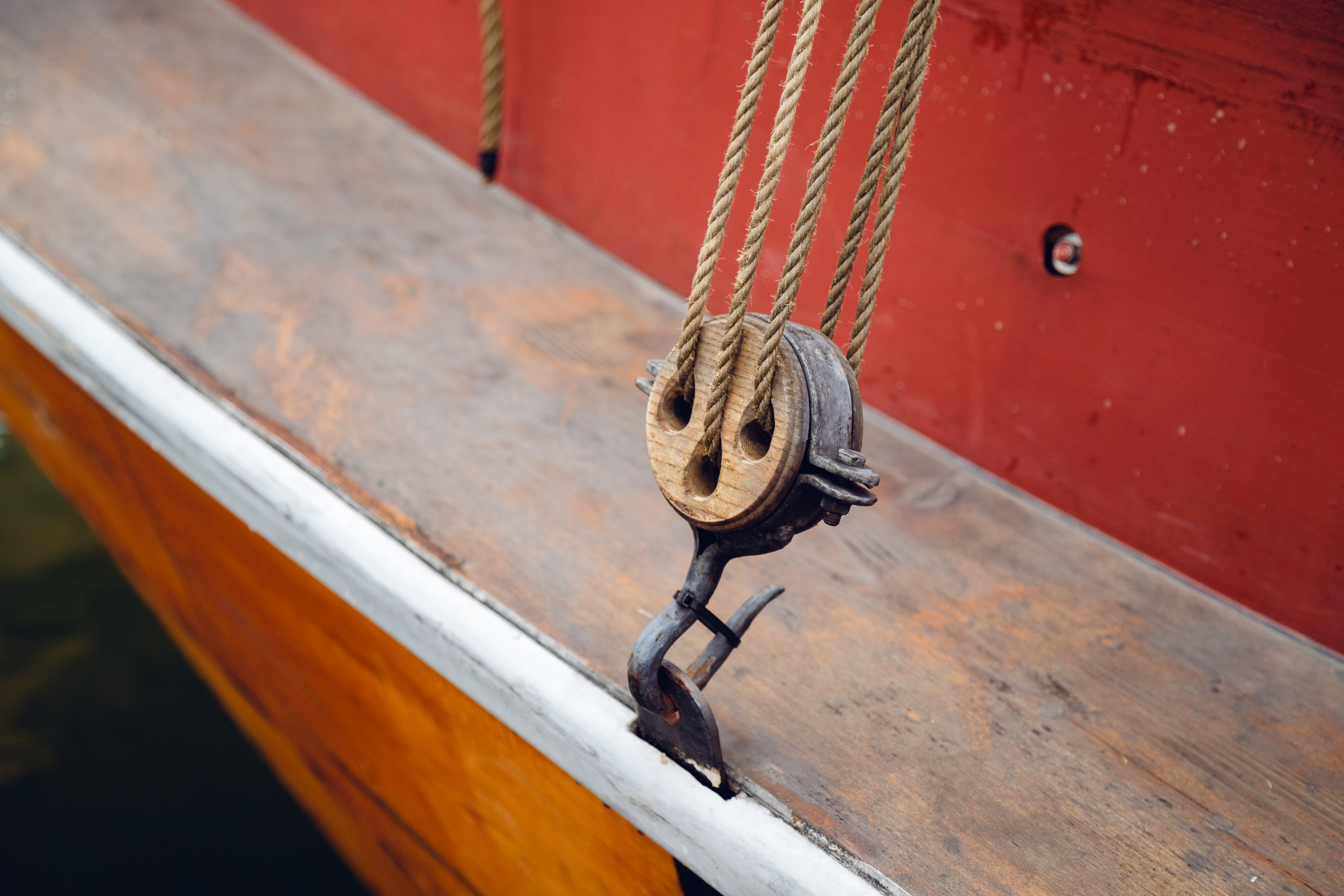 Gästhamnen i Nagu Storbåt Tacksamheten